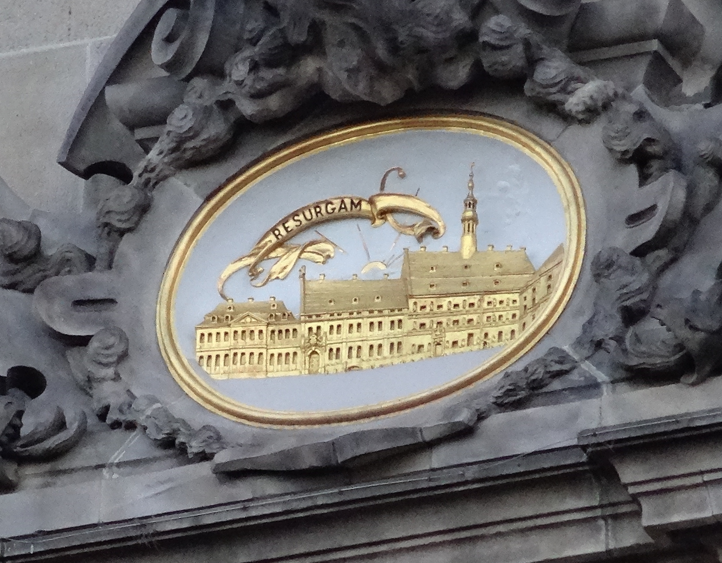 Medaillon mit einer Abbildung des alten Hamburger Rathauses an der Trostbrücke und darüber RESURGAM ("Ich stehe wieder auf")